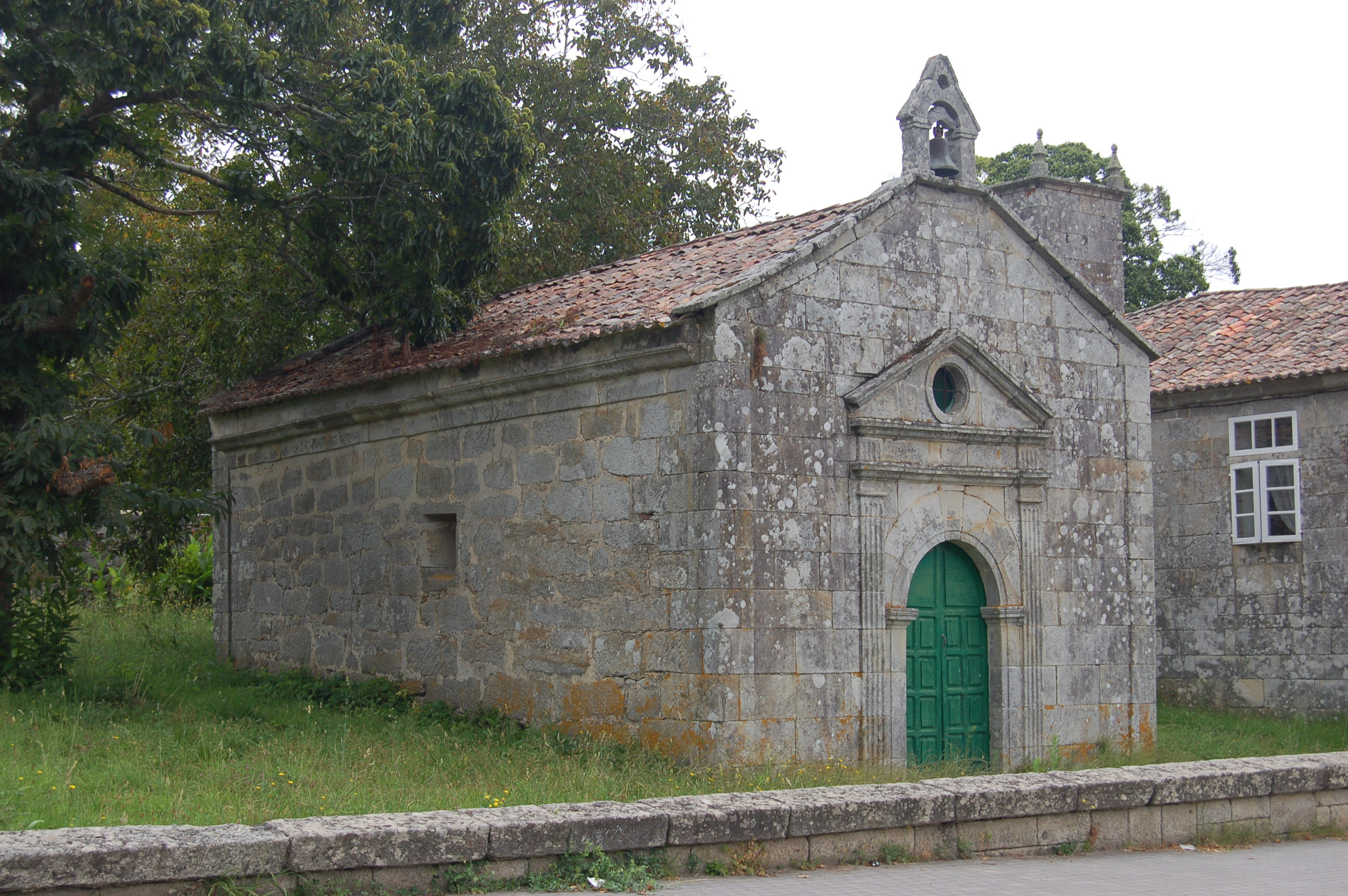 Capela dos Pardo, en Vilalonga (Sanxenxo). A capela está entre os pazos de Rebel e dos Pardo, pero pertence a este último.